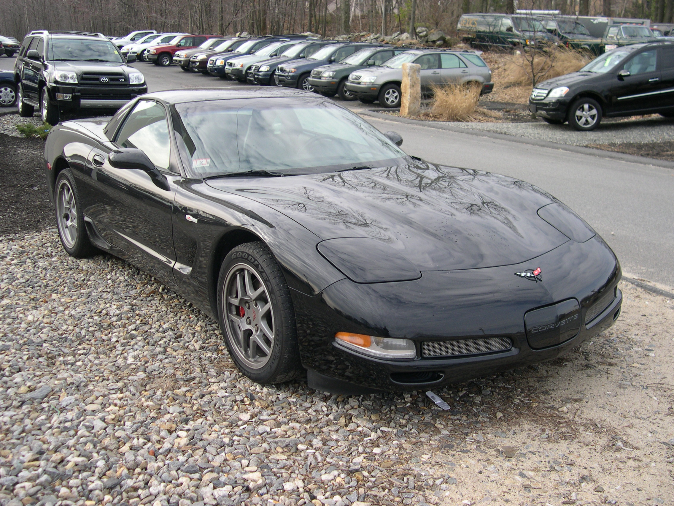 2002 Chevrolet Corvette Z06